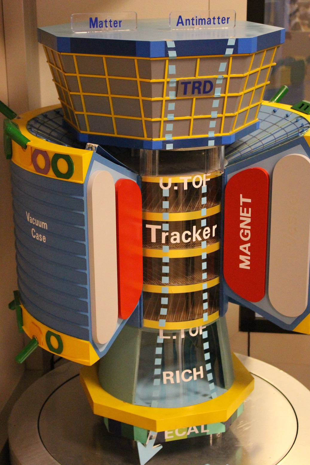 מודל המציג את שכבותיו של הAMS 02